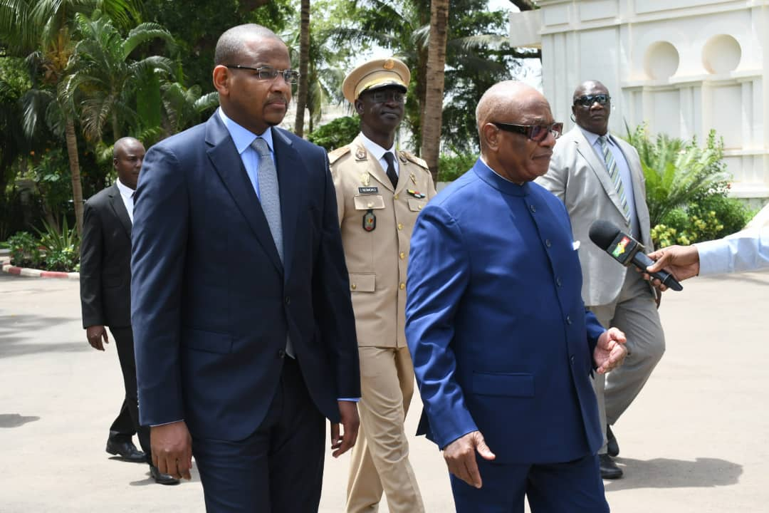 Le premier Ministre du Mali, Boubou Cissé et le président Ibrahim Boubakar Keita (en juin 2019). La même image sous d'autres angles : [1] et [2].